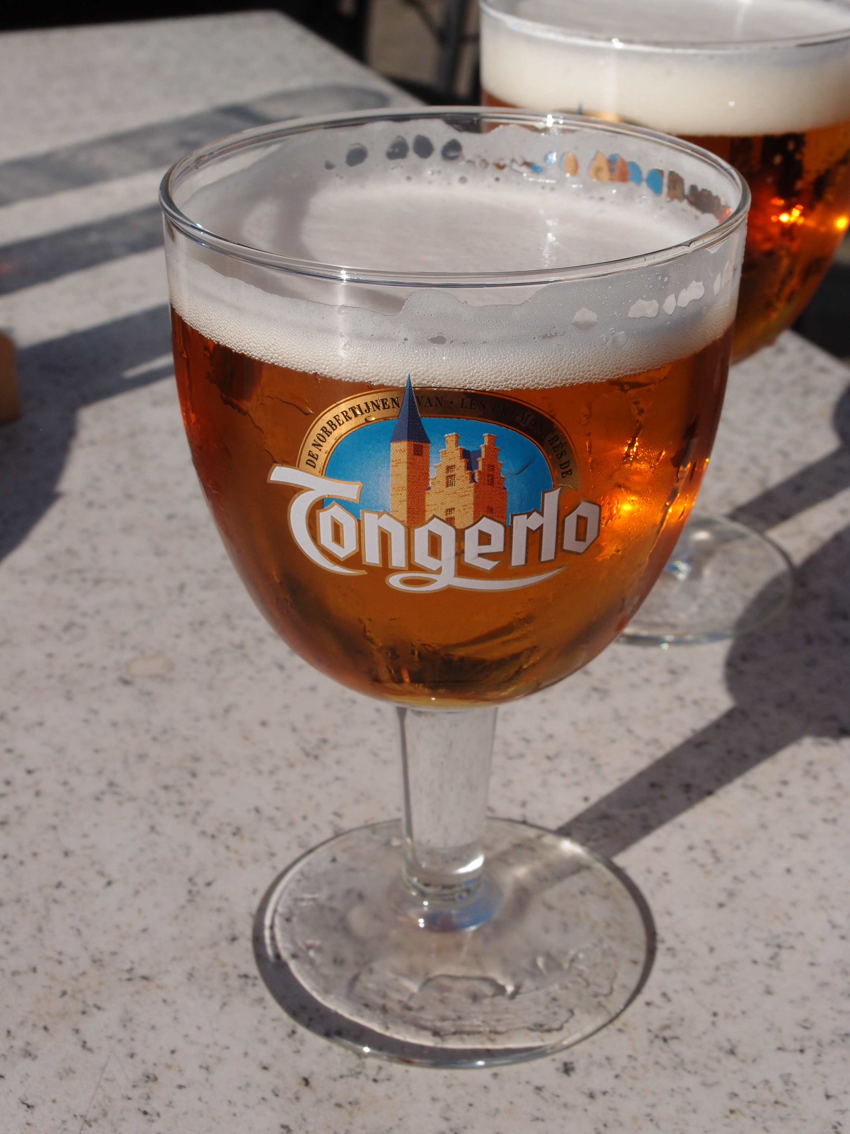 Abteibier "Tongerlo Blond" vom Fass (gebraut durch belg. Brauerei Haacht) Datum: 09.03.2014 Urheber: M. Pfeiffer alias Benutzer:Gordito1869 Quelle: privates Fotoarchiv des Urhebers